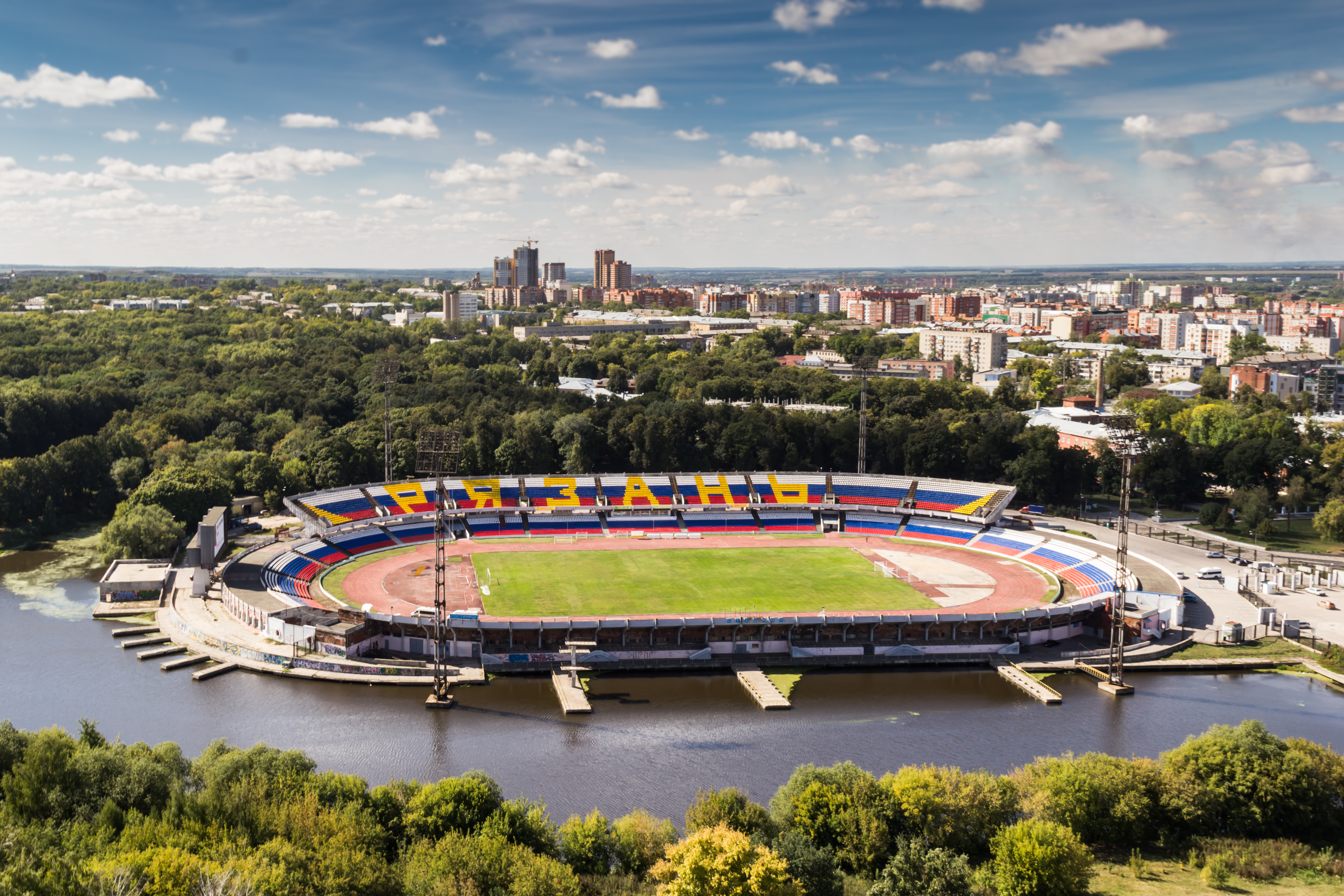 Oktyabrskiy rayon, Ryazan', Ryazanskaya oblast', Russia